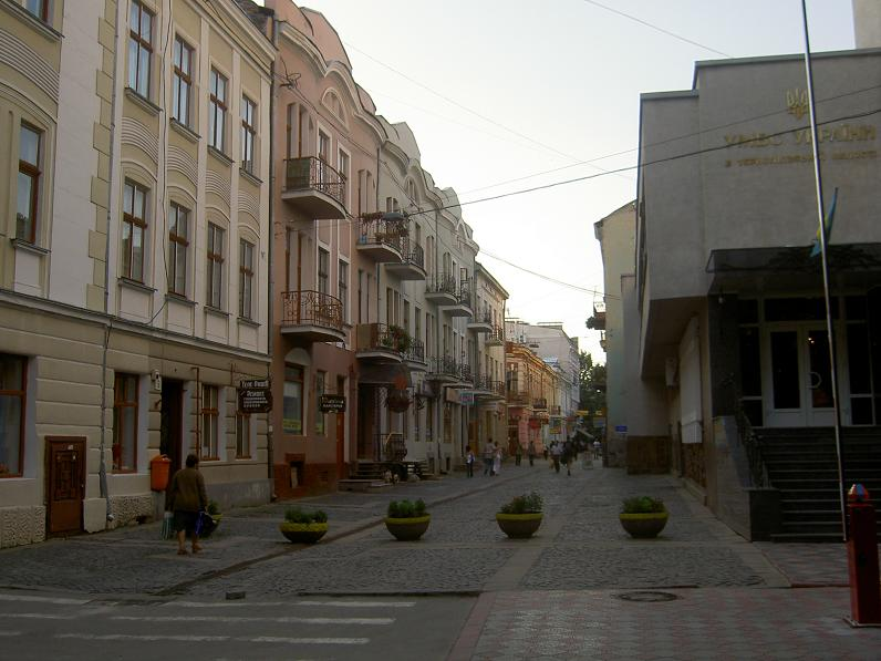 Ternopil, ulička v centru města